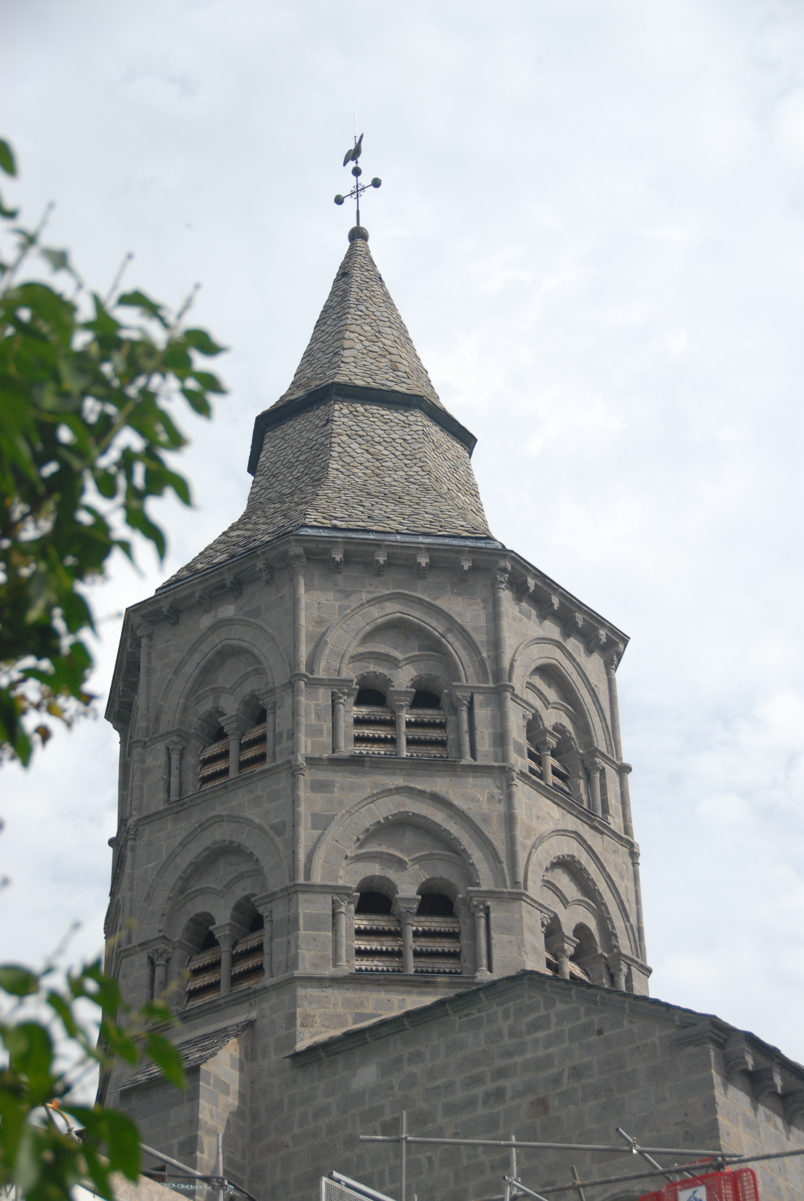 N.-D. d'Orcival, Vierungsturm von SW